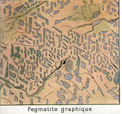 Roche - pegmatite graphique